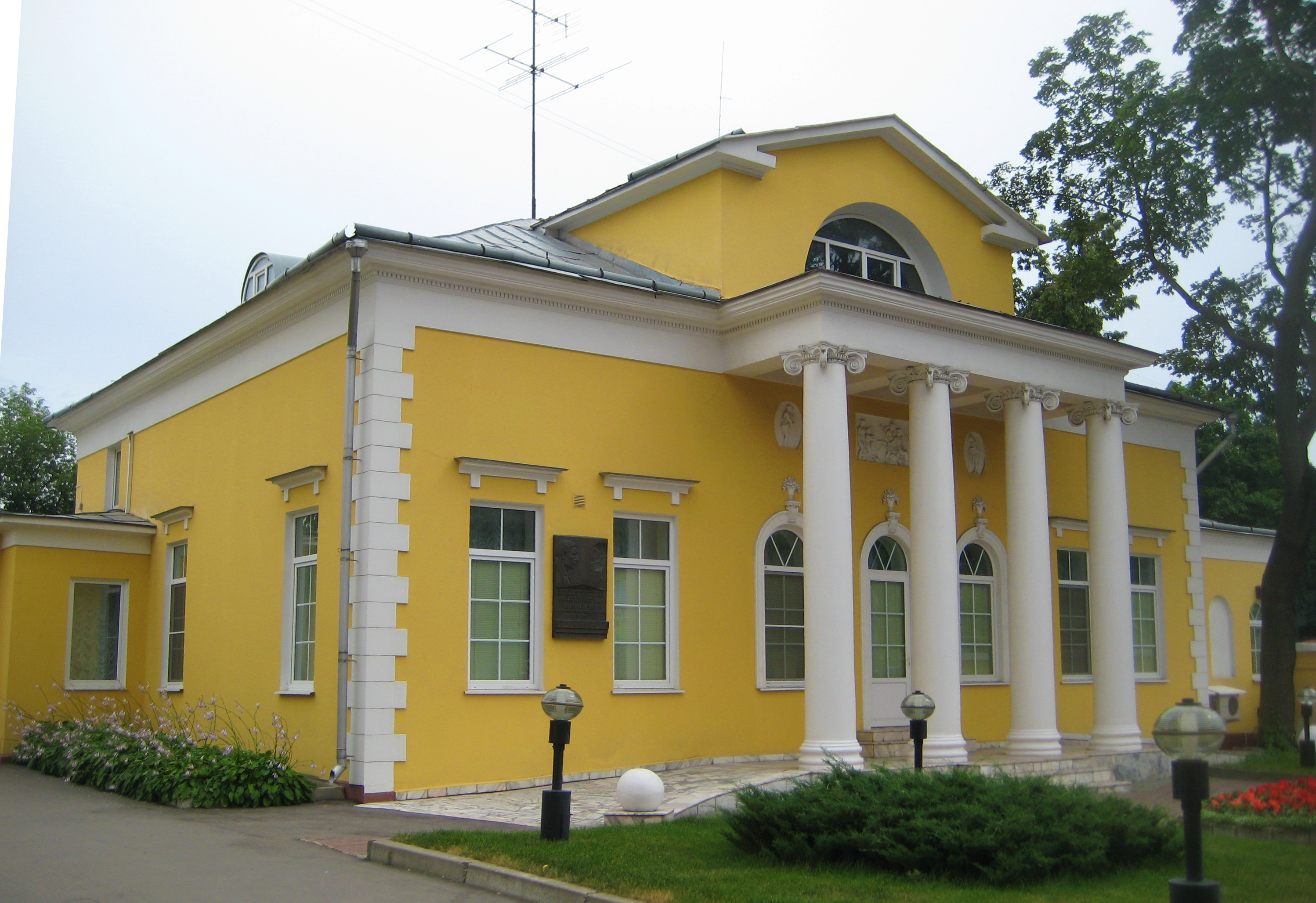 Главный дом усадьбы Н. О. Косыревой - Абрикосовых